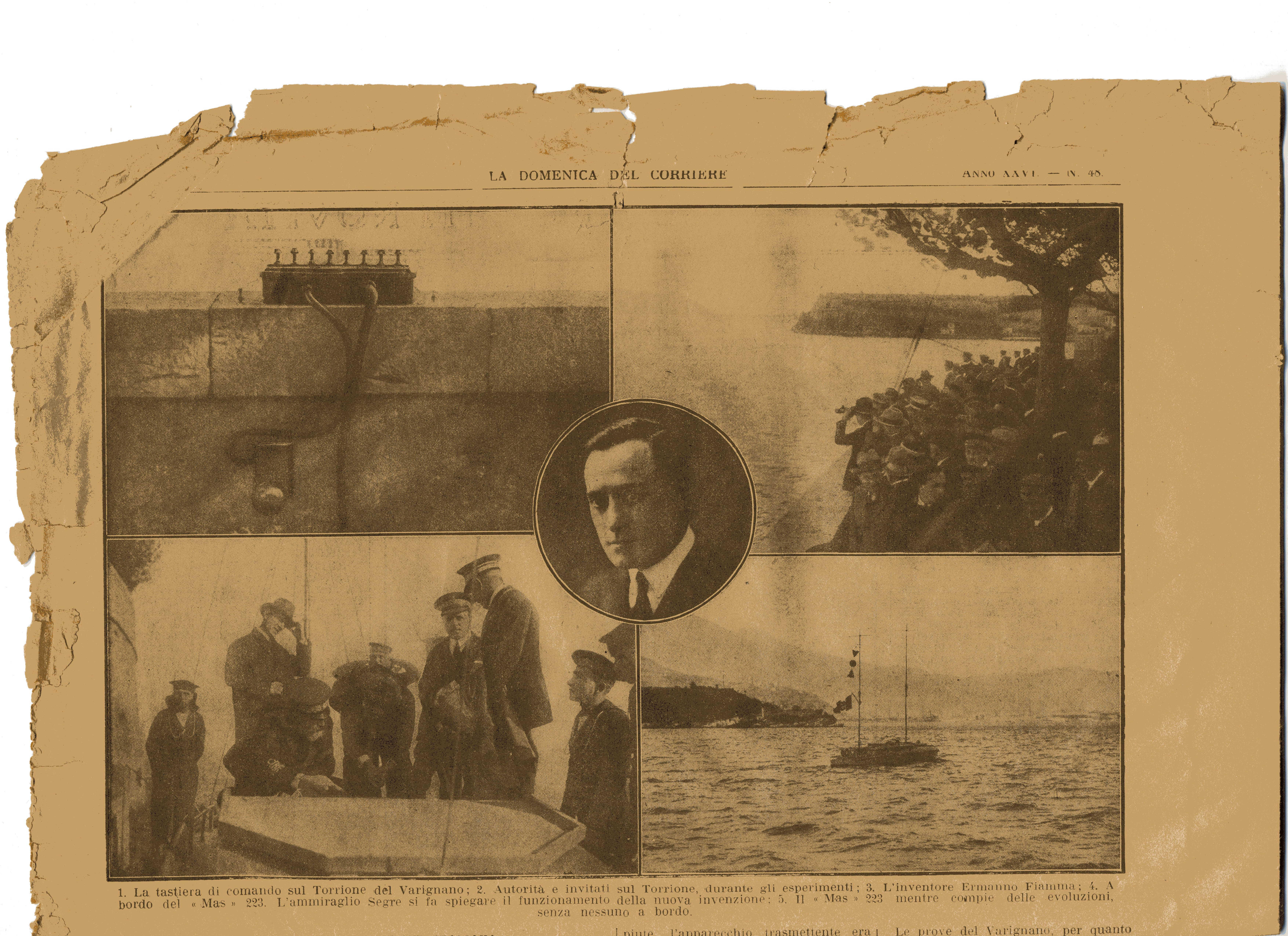 Pupitre de commande situé sur la tour Varignano